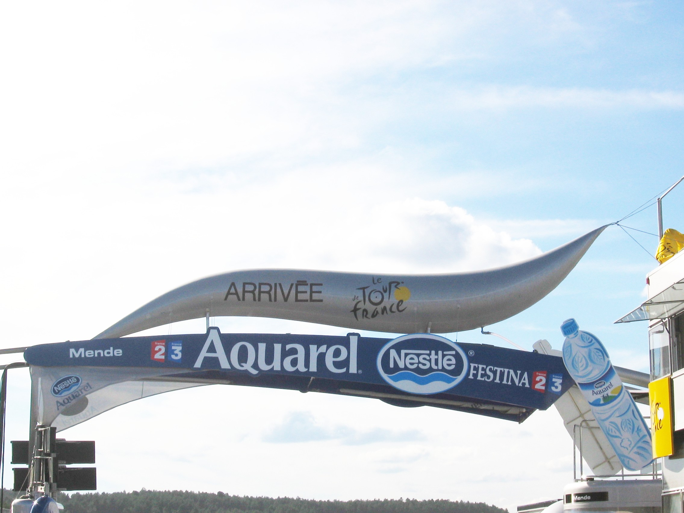 Photo personnelle (de Sanguinez de l'arrivée du Tour de France à Mende en 2005, mise à la disposition de tous! This is an own photography of the final line in Mende during the 2005 Tour de France